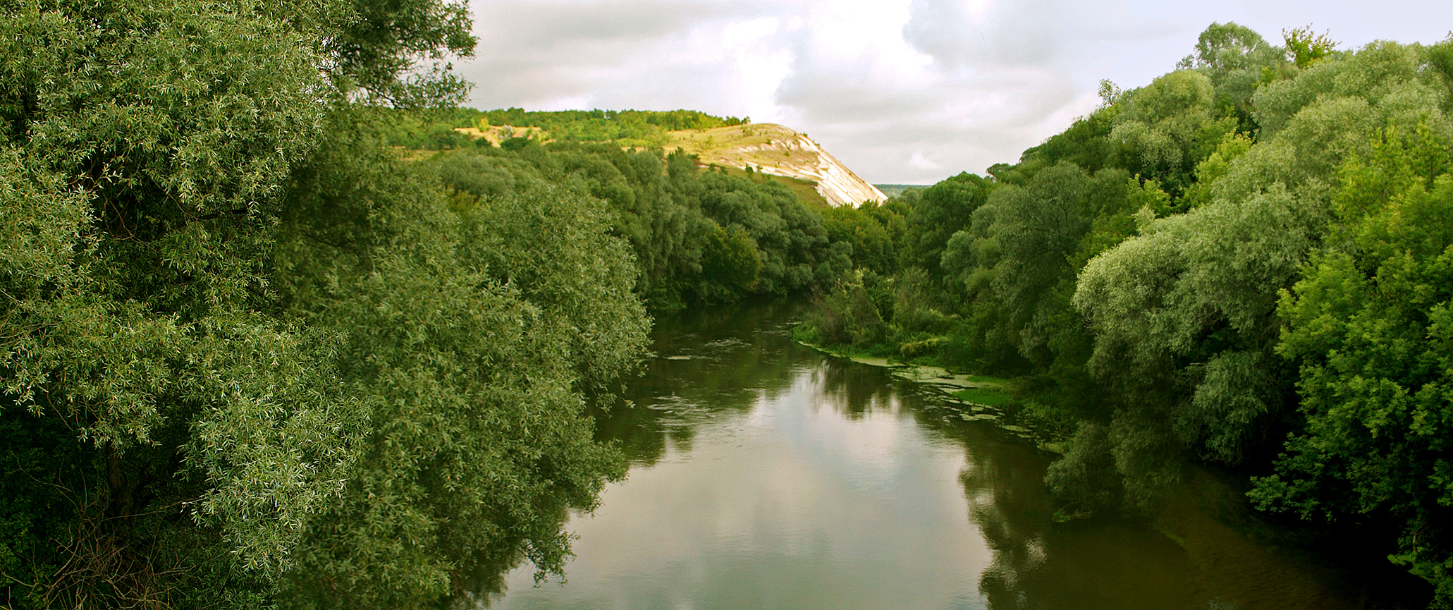 Река Оскол. Новооскольский район Белгородской области.